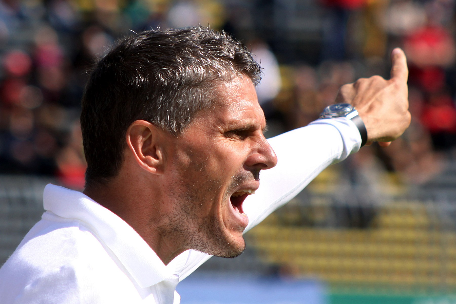 Meisterschaftsspiel der österreichischen Bundesliga: SV Mattersburg gegen FC Admira Wacker Mödling am 26. Mail 2013 (0:0)] im Mattersburger Pappelstadion.] - Das Foto zeigt den Trainer des FC Admira Wacker Mödling Dietmar Kühbauer.